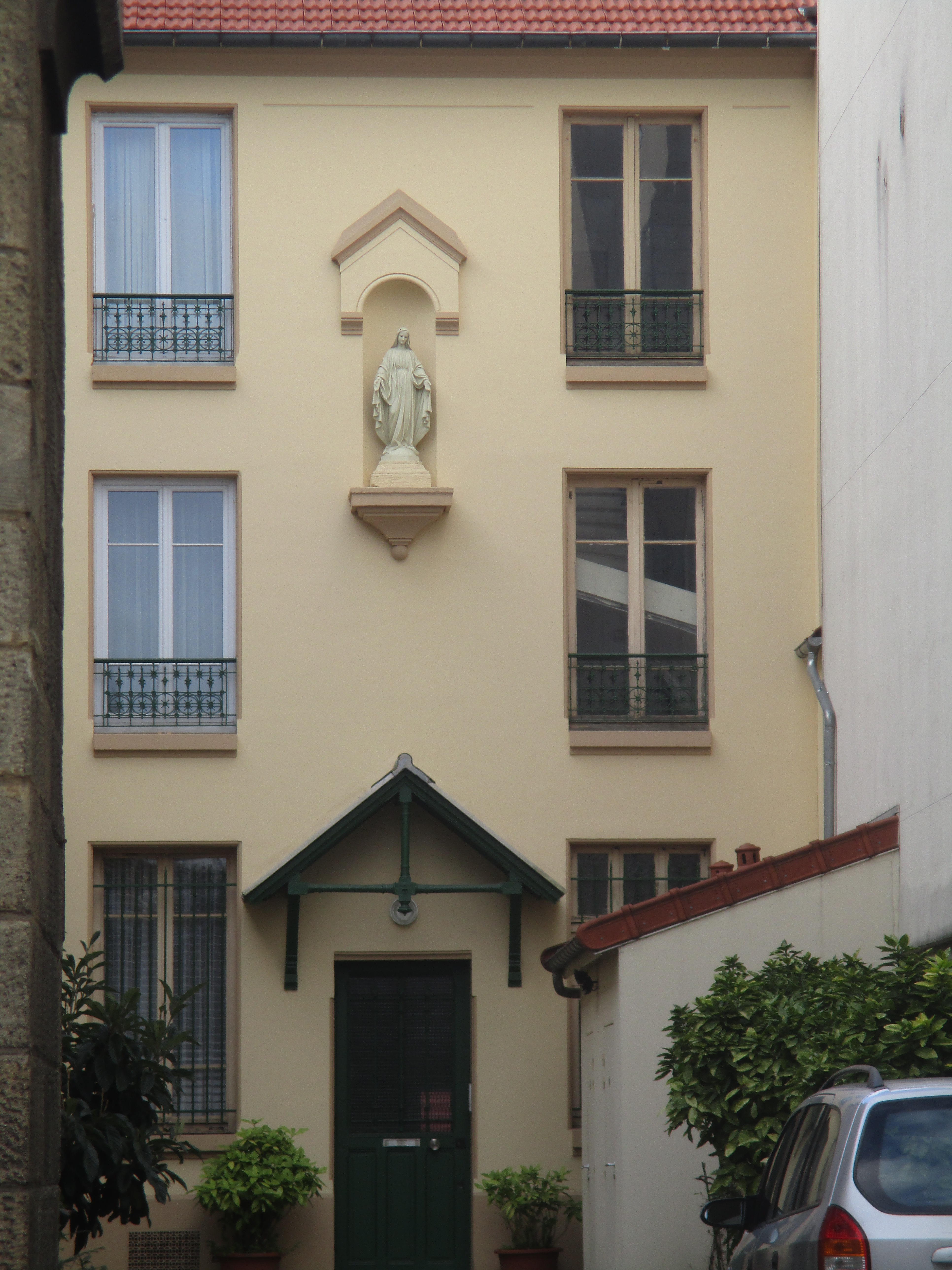 Maison paroissiale de l'église Sainte-Geneviève de La Plaine-Saint-Denis, avenue du Président Wilson.